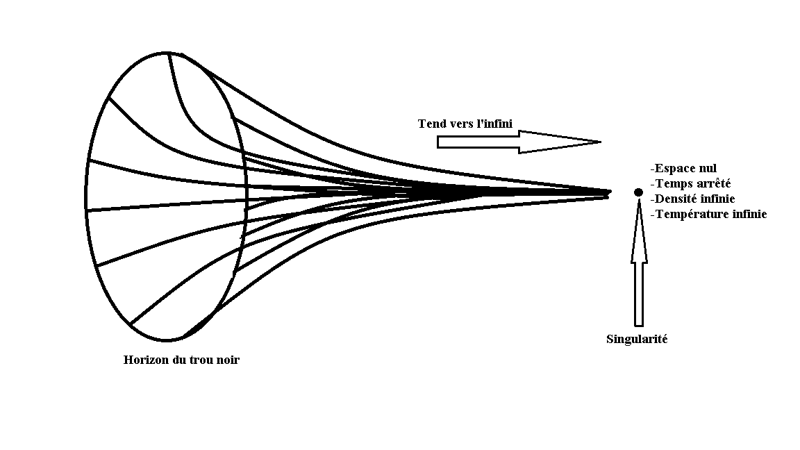 Représentation théorique d'un trou noir et de sa singularité.